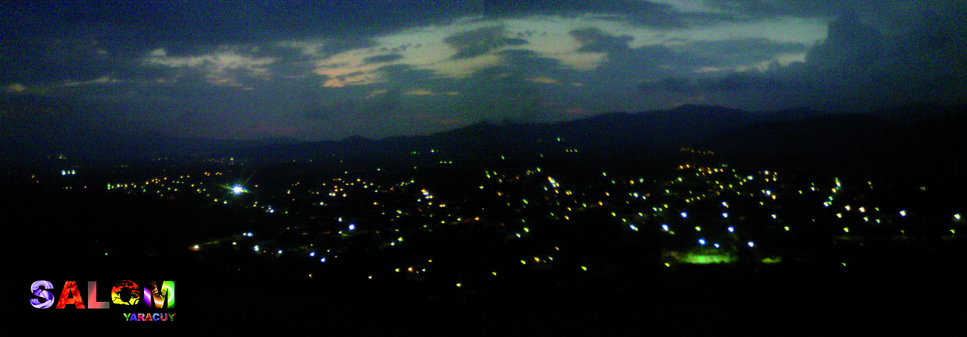 vista panoramica del centro de Salom en el estado Yaracuy Venezuela.